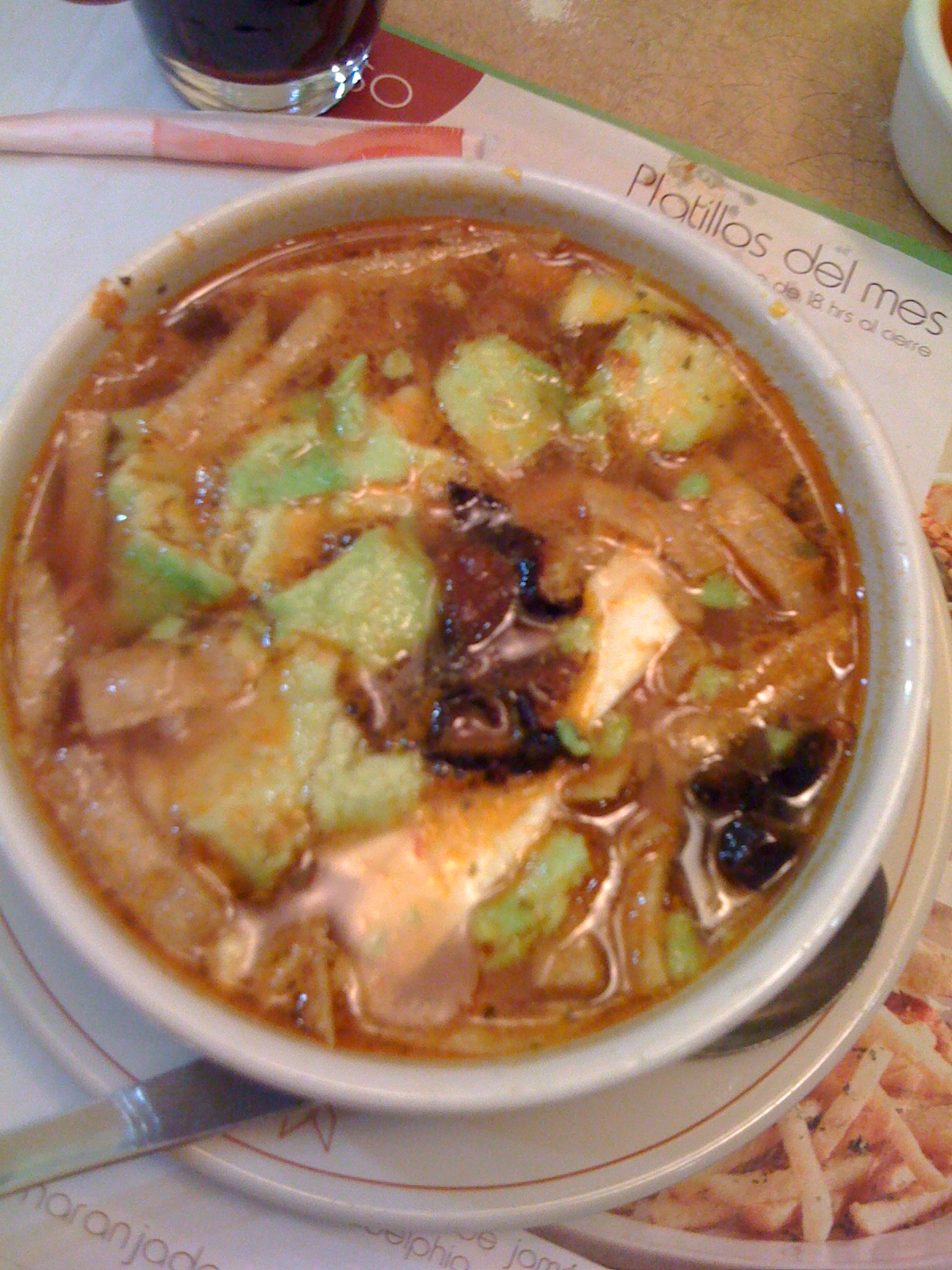 Un plato de caldo tlalpeño, comida mexicana. / A bowl of tlalpeño soup ("Caldo Tlalpeño"), Mexican food.